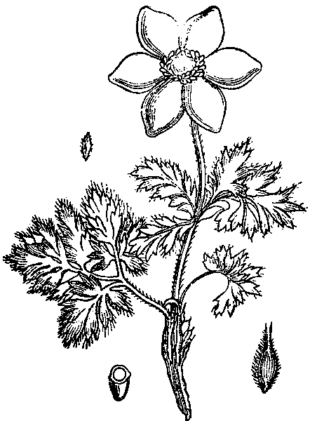 Sl. 21. Planinski kosmatinec. (Anemóne alpina.)